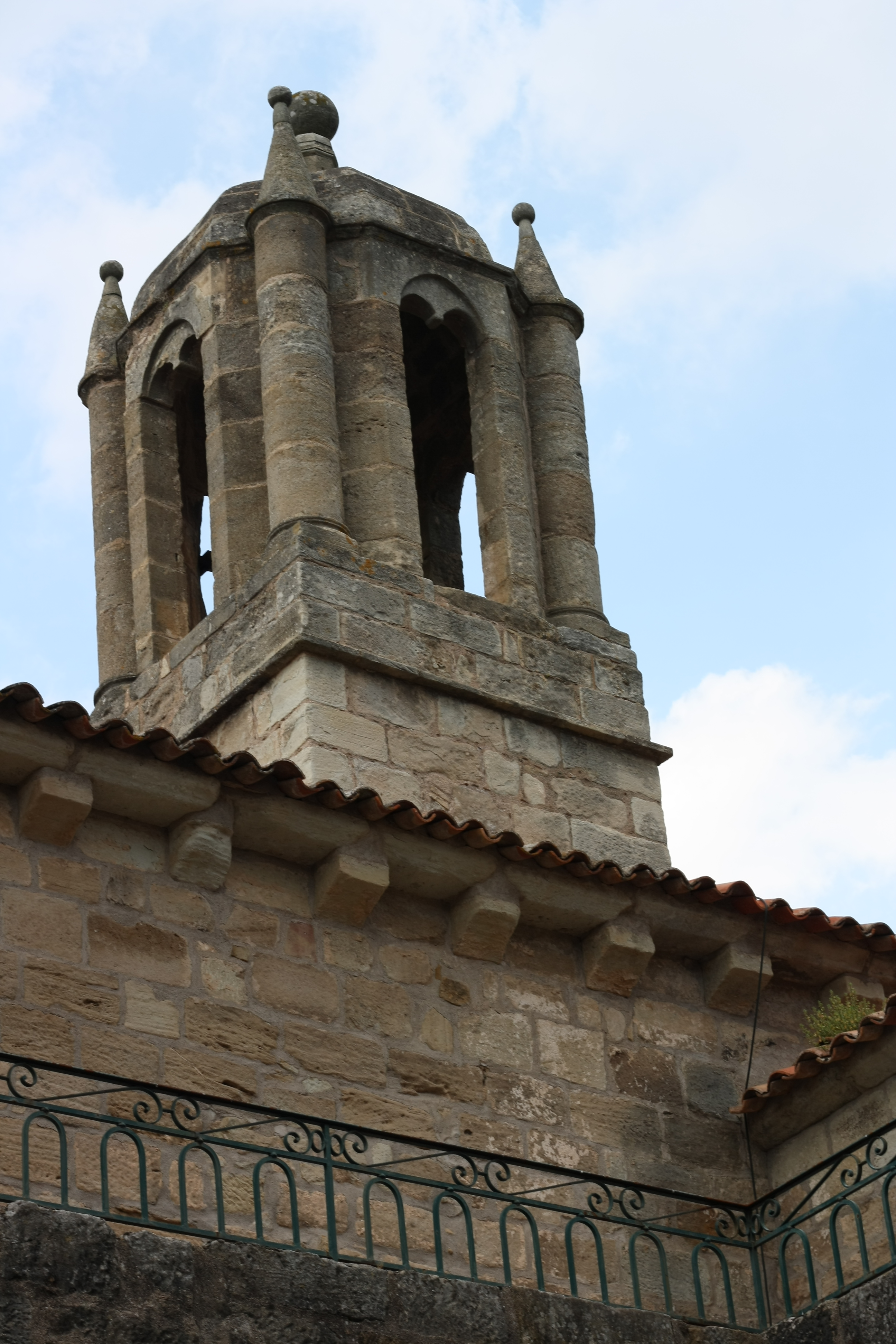 Glockenturm der Kirche des Priorats Saint-Michel de Grandmont